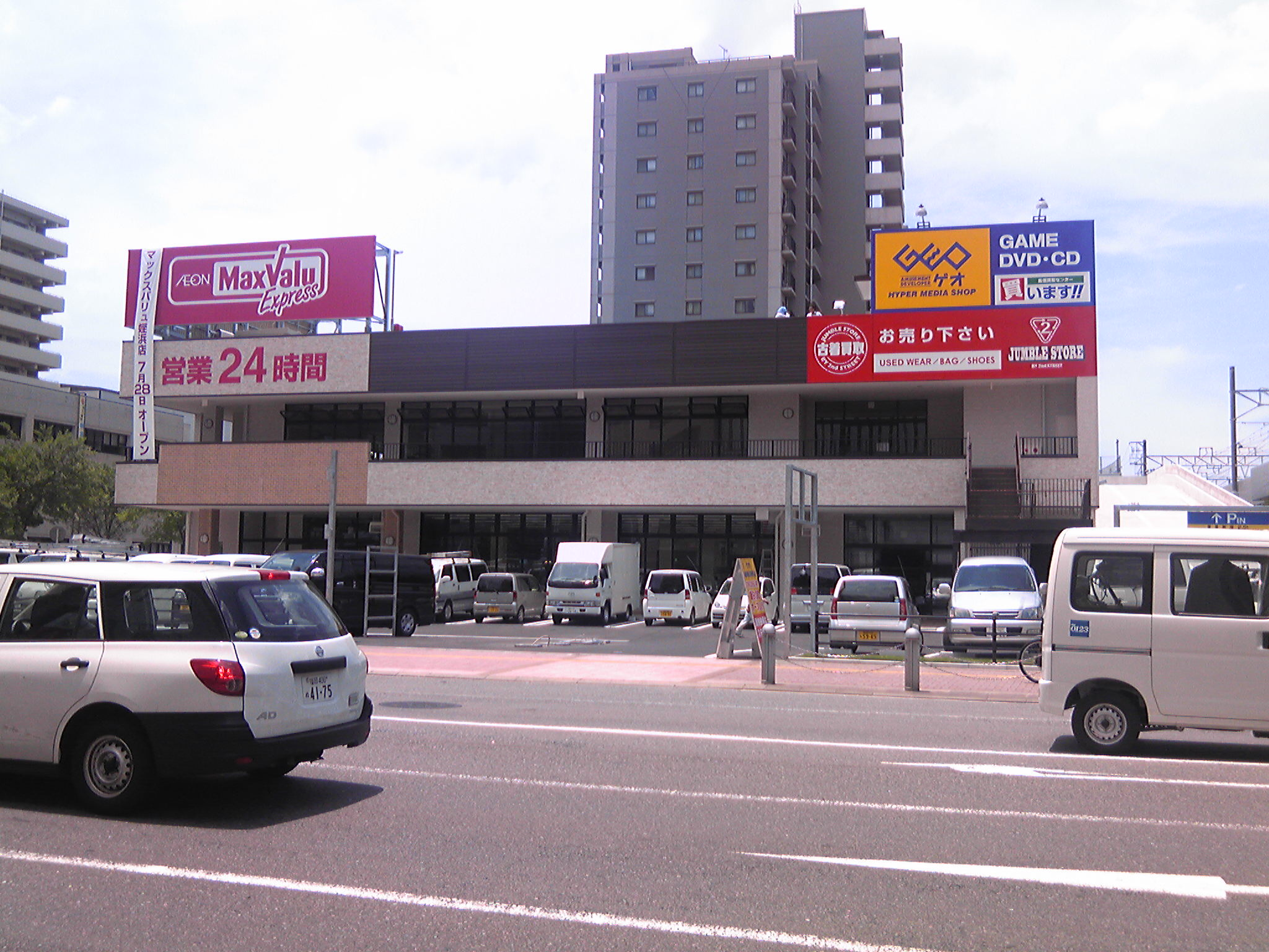 開業に向け工事中のマックスバリュエクスプレス姪浜駅前店（福岡市西区）